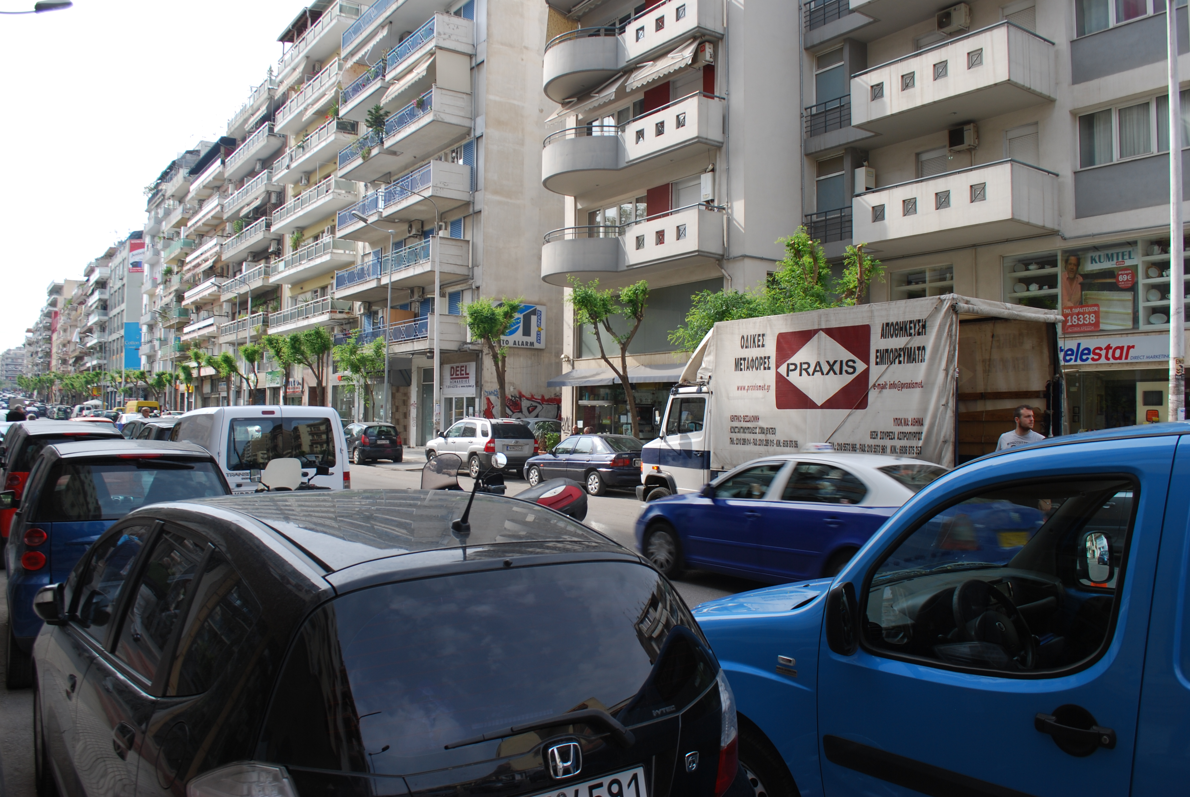 Vue de la rue saint-Demetreios (Odos Agiou Dimitriou) à Thessalonique en Grèce.